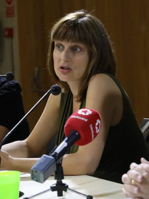 La Auditoría Ciudadana Municipal de la Deuda y las Políticas Públicas (ACMDPP) avanza y está dando los primeros resultados desde su creación por mandato del Pleno del Ayuntamiento en 2015. Buena muestra de ello es que, según el informe elaborado por la Subdirección General de Auditoría de la Deuda y las Políticas Públicas del Área de Economía y Hacienda, en el contrato de explotación de la gestión integral y energética de instalaciones urbanas (GENIU) adjudicado en 2014 se han apreciado duplicidades, que podrían suponer unos costes aumentados entre 60 y 100 millones de euros.